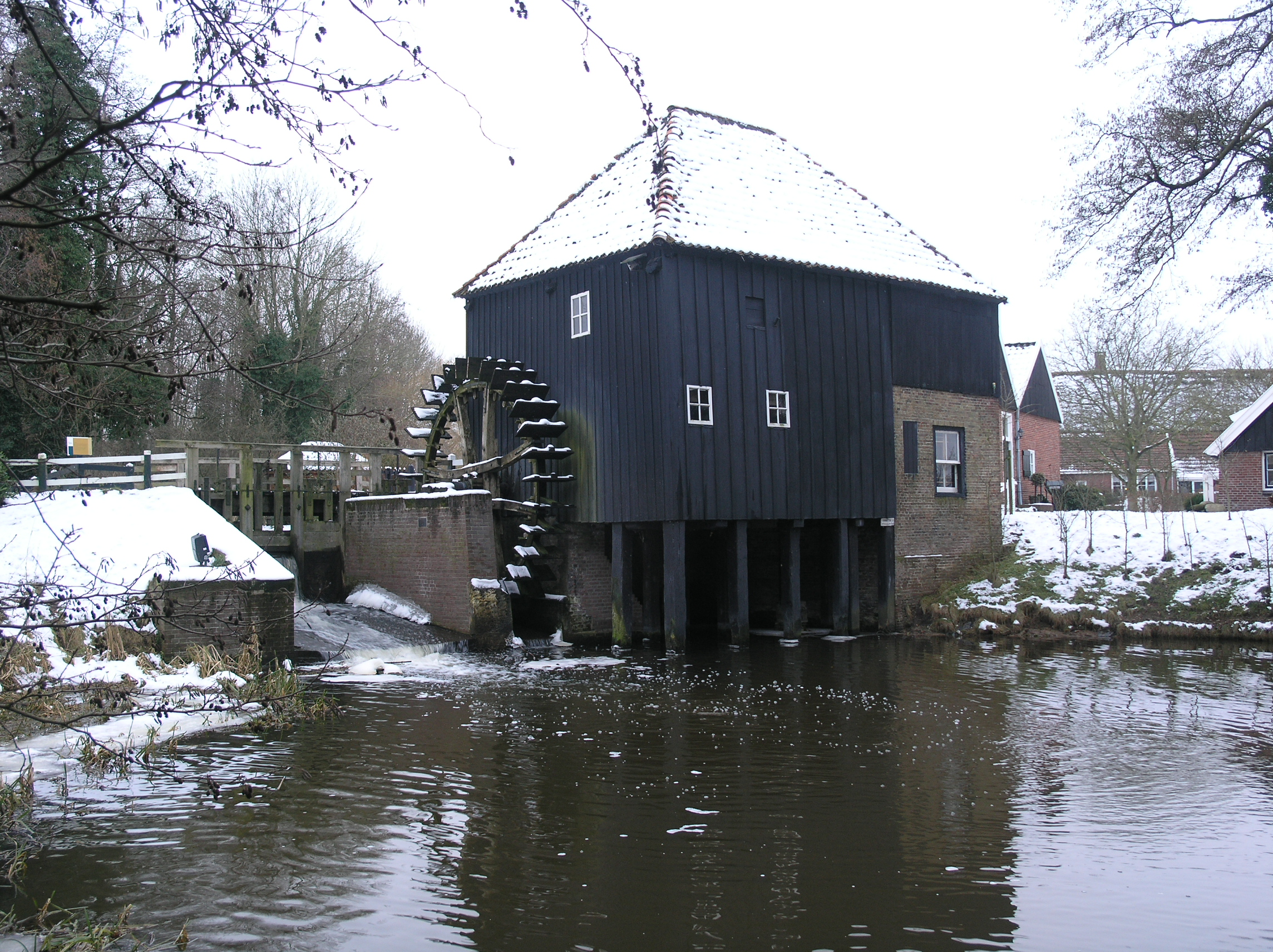 Diepenheim Den Haller